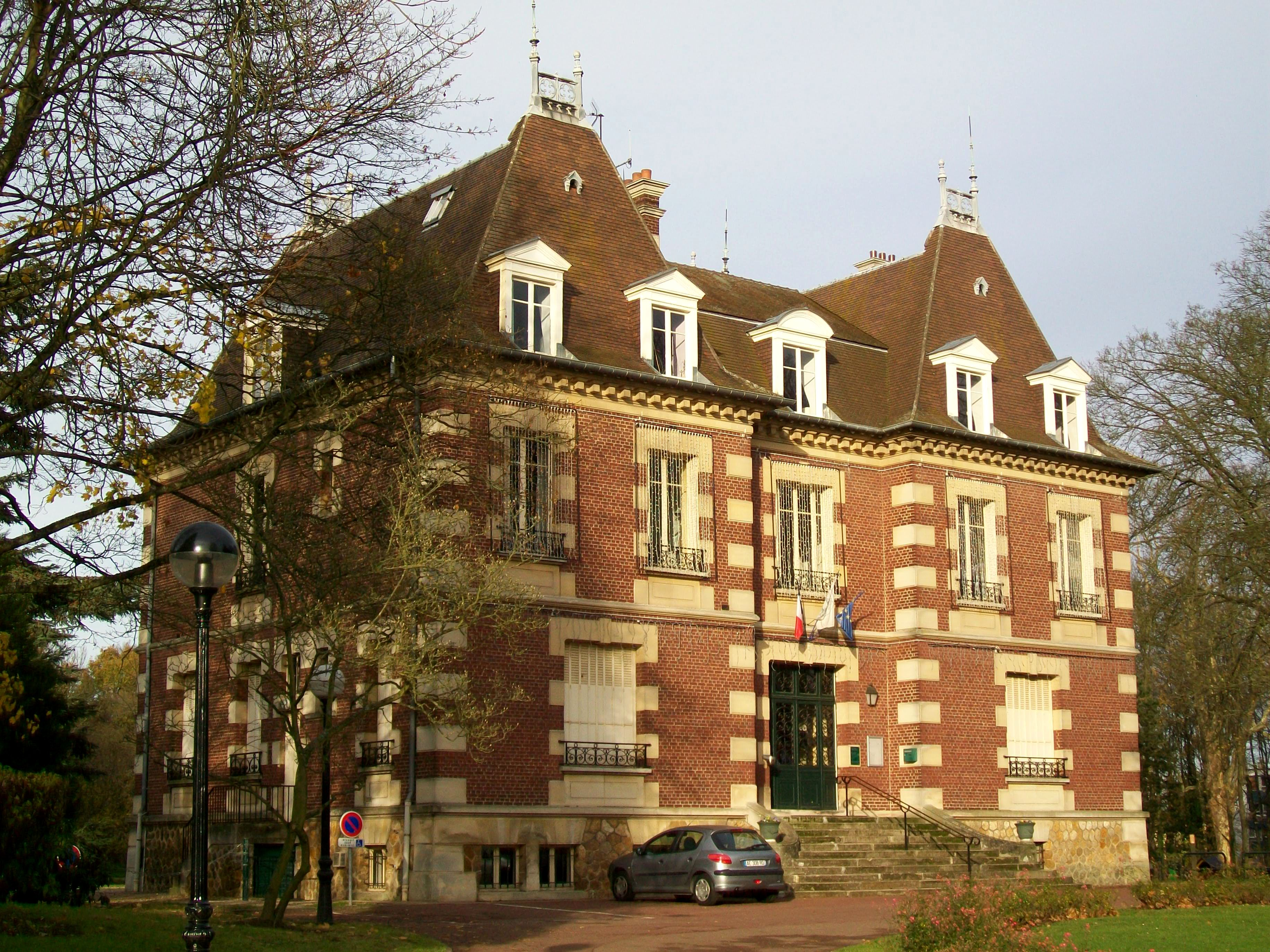 L'Hôtel de Ville de Survilliers (95) côté rue, ancienne demeure bourgeoise de 1903-05.